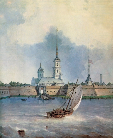 Вид на Петропавловскую крепость первой половины XIX века. Скан с копии работы неизвестного художника 1845 года